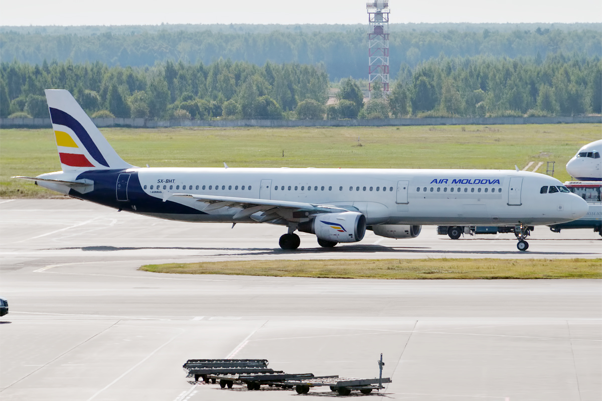 Air Moldova, SX-BHT, Airbus A321-211